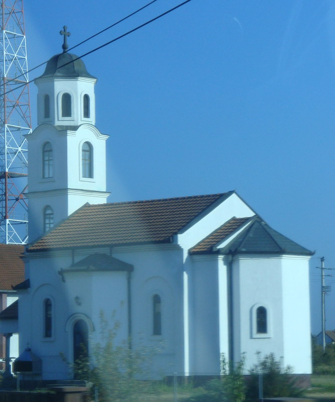 Храм Св. Сисоја (Доњи Драгаљевац)